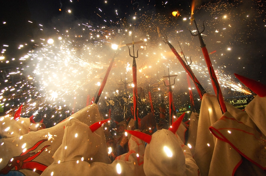 Diables de Vilafranca encesa